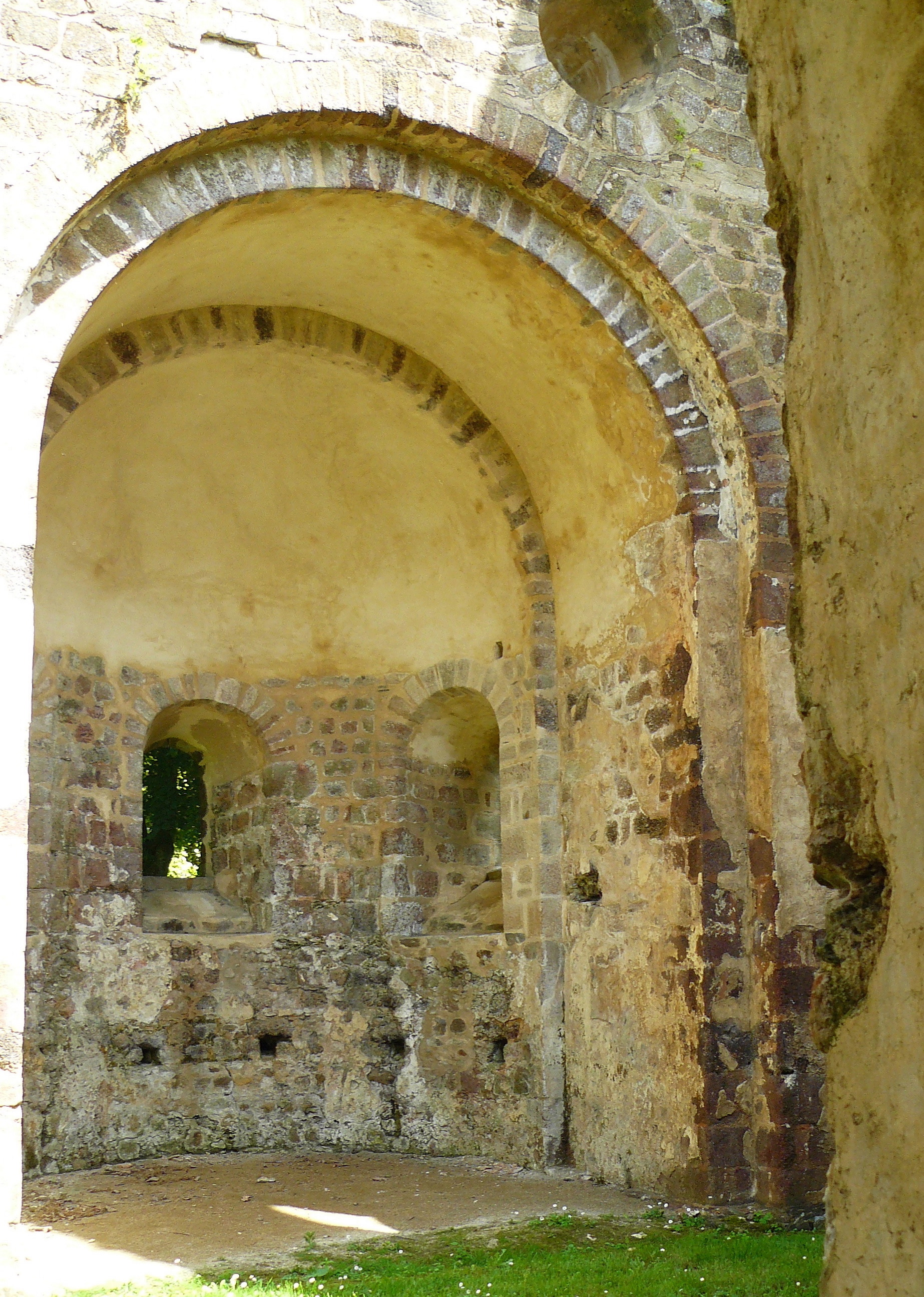 absidiole sud (entièrement xiie siècle) de l'abbatiale de l'abbaye double Notre-Dame du Nid-au-Merle (ou abbaye Saint-Sulpice), à Saint-Sulpice-la-Forêt, à 15 km au nord de Rennes, en Bretagne.